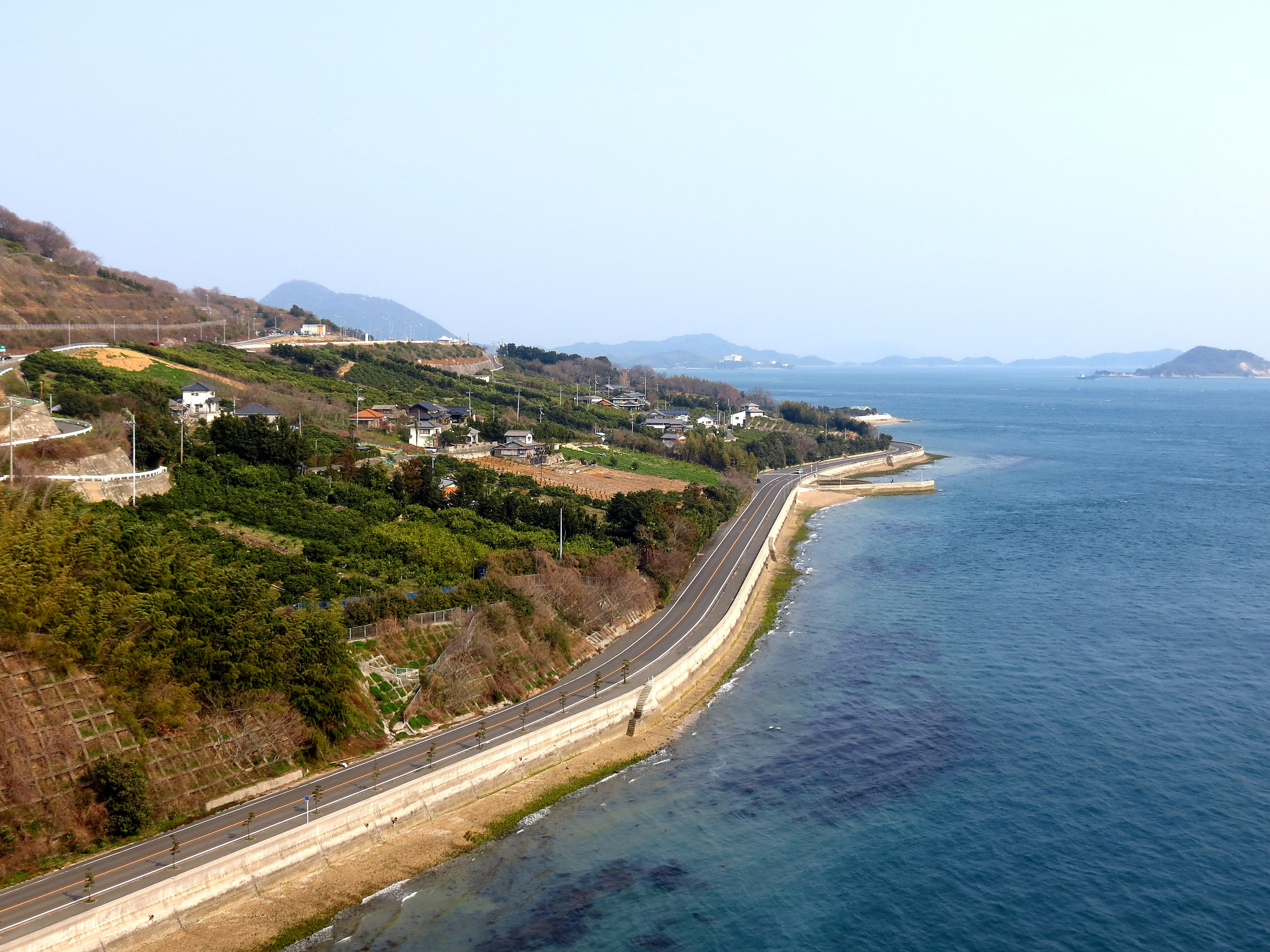 多々羅大橋から見た生口島と瀬戸内海。2014年3月中旬撮影。